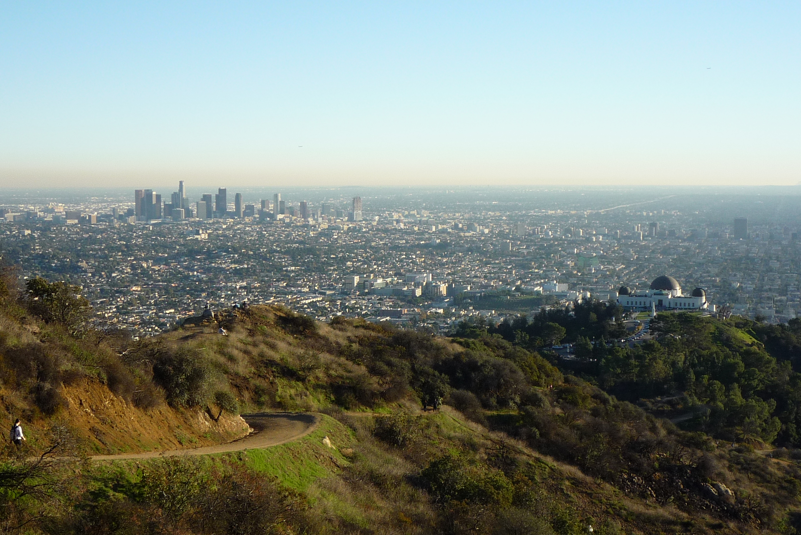 Hollywood Hills